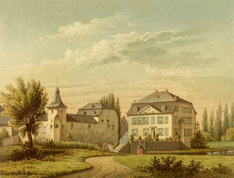 Haus Overbach, Kreis Jülich